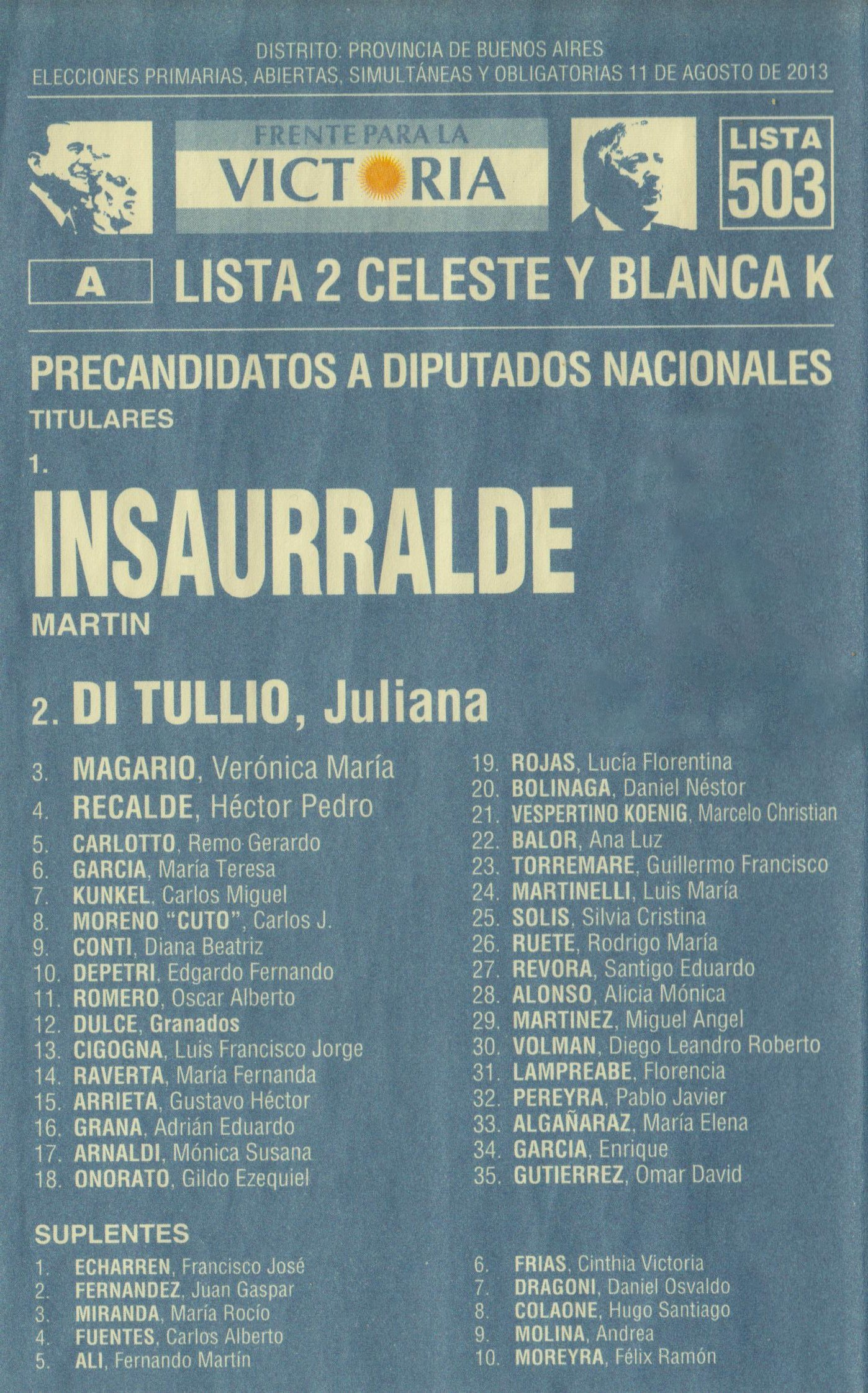 Boleta electoral utilizadas en la Provincia de Buenos Aires para las elecciones primarias de Argentina de 2013, con los candidatos del Frente para la Victoria.